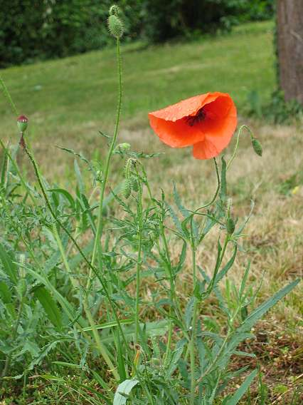 Klatschmohn (Papaver rhoeas), rechts Blüte, am linken Bildrand Fruchtkapsel